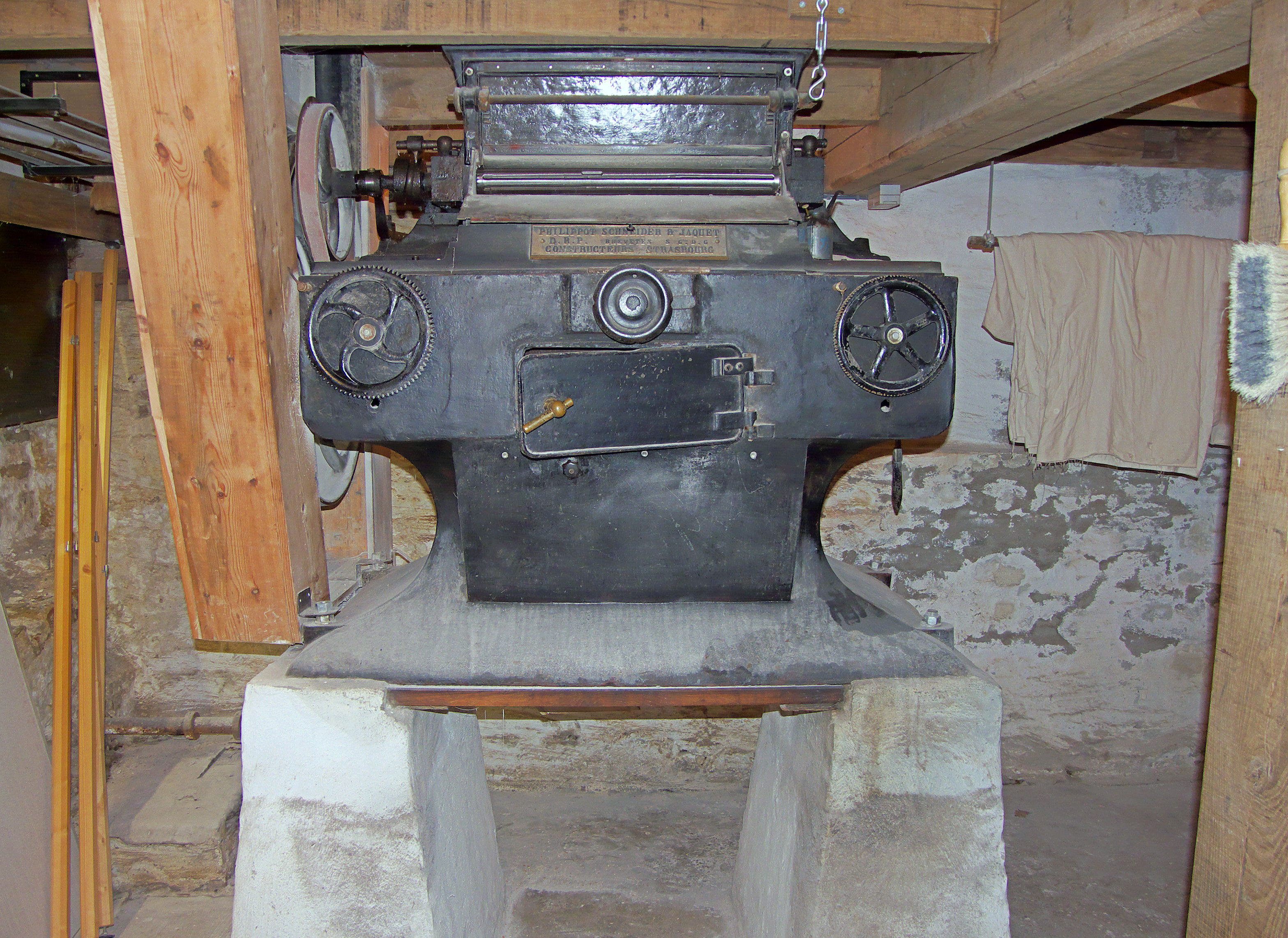 Oostendorper Watermolen, Haaksbergen, pletter aangedreven door waterrad